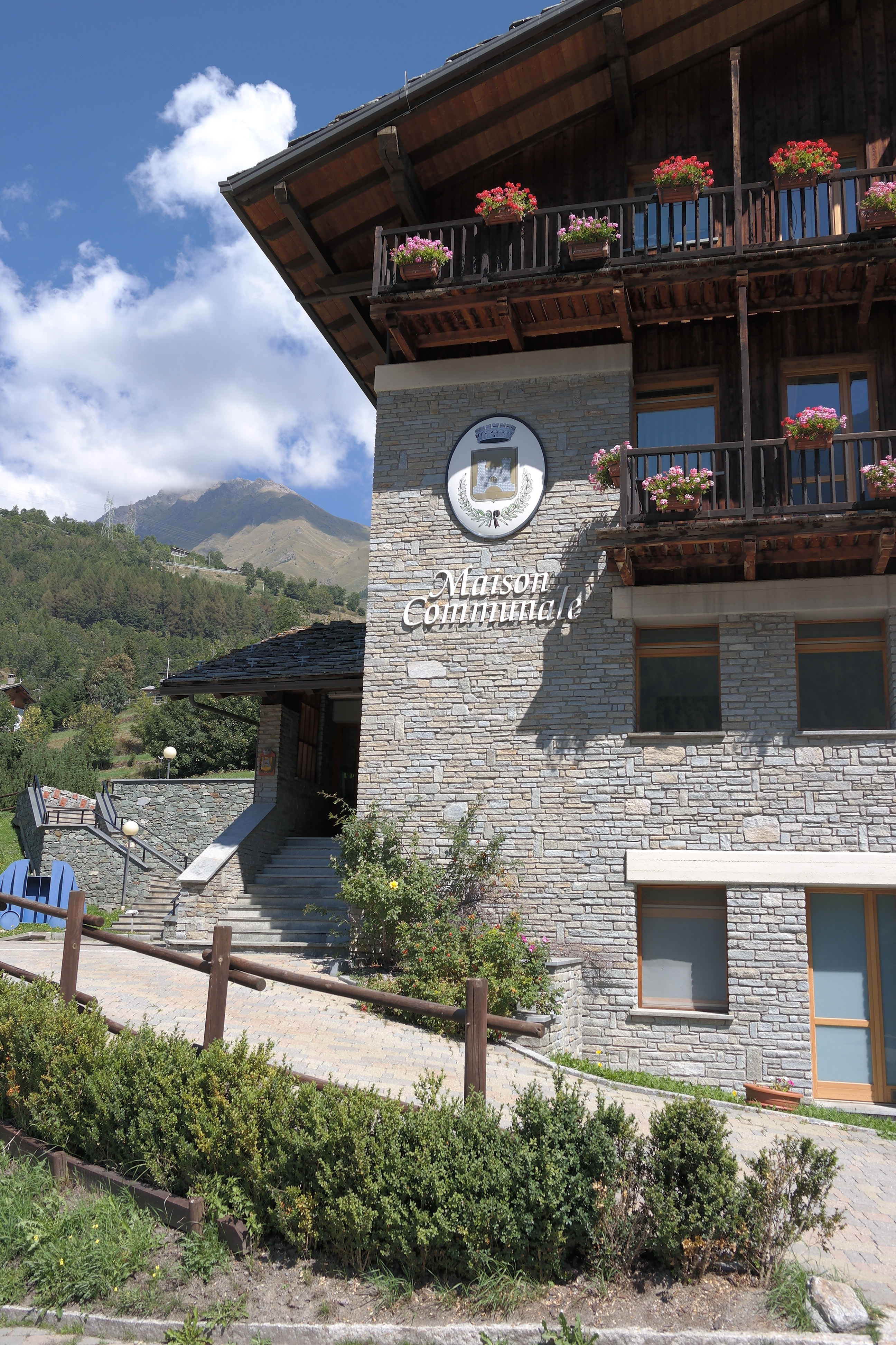 Municipio di Etroubles